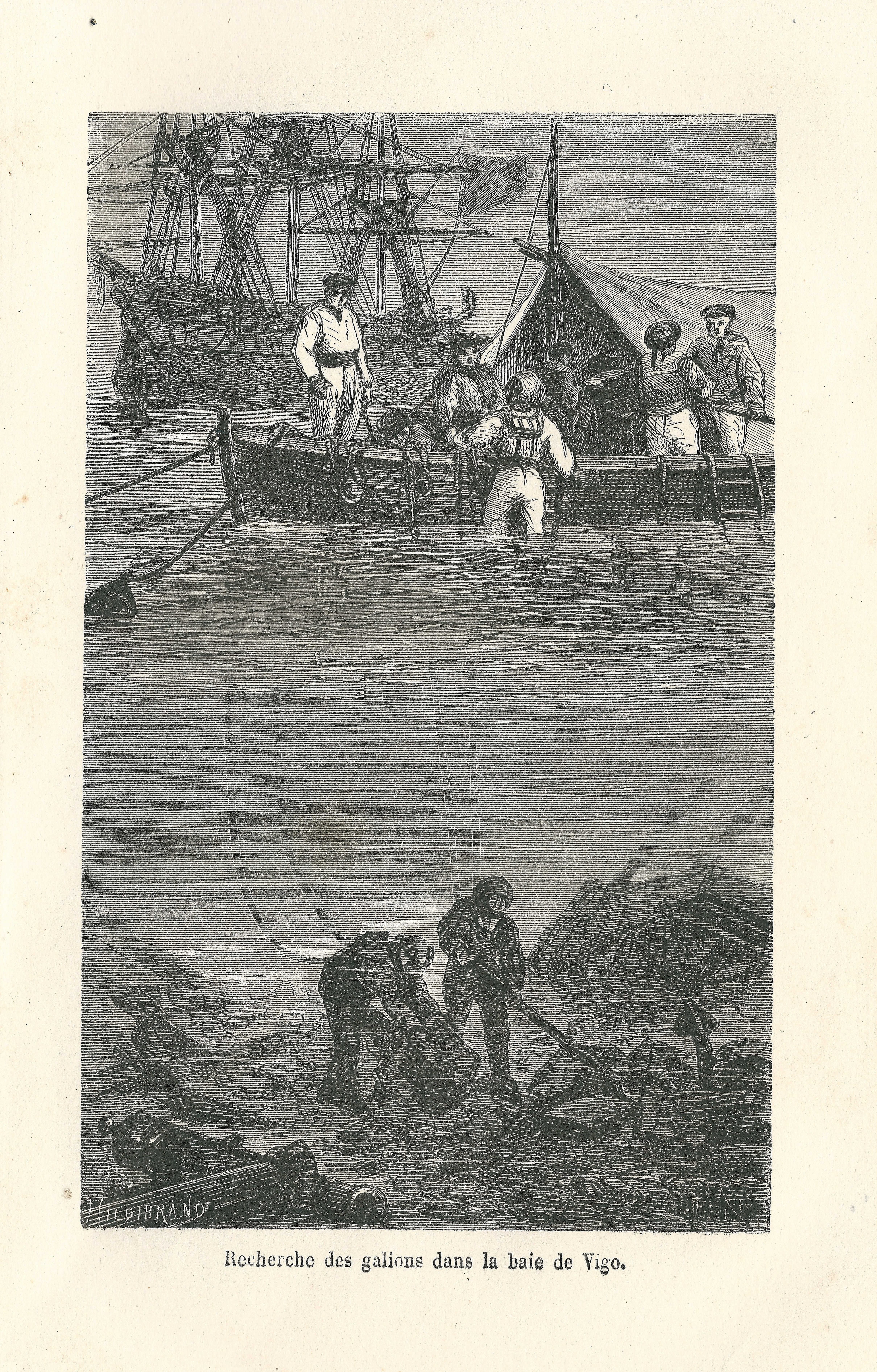 Gravure de Jules Noël tirée de : Zurcher & Margollé, Les Naufrages célèbres, Paris : Hachette, 3e édition, 1877